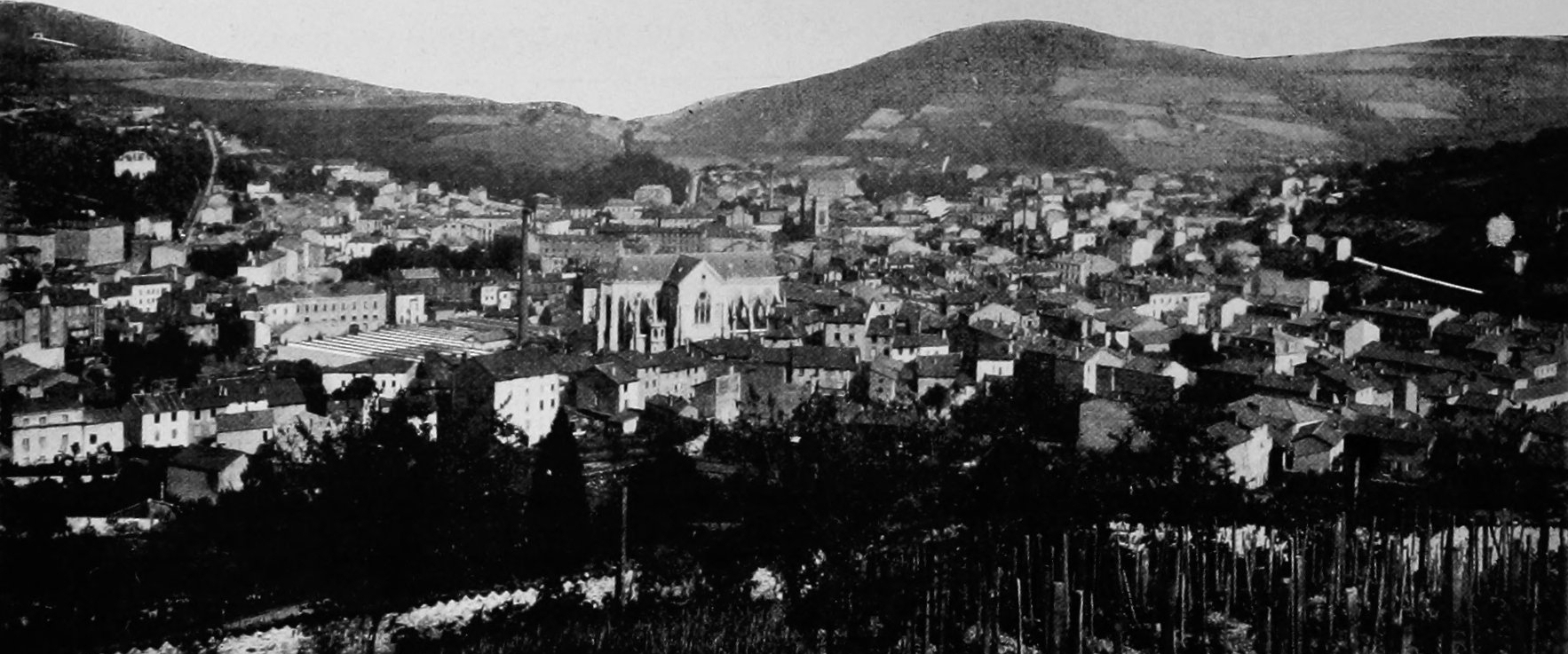 Dictionnaire illustré des communes du département du Rhône. Tome 2 / par MM. E. de Rolland et D. Clouzet.